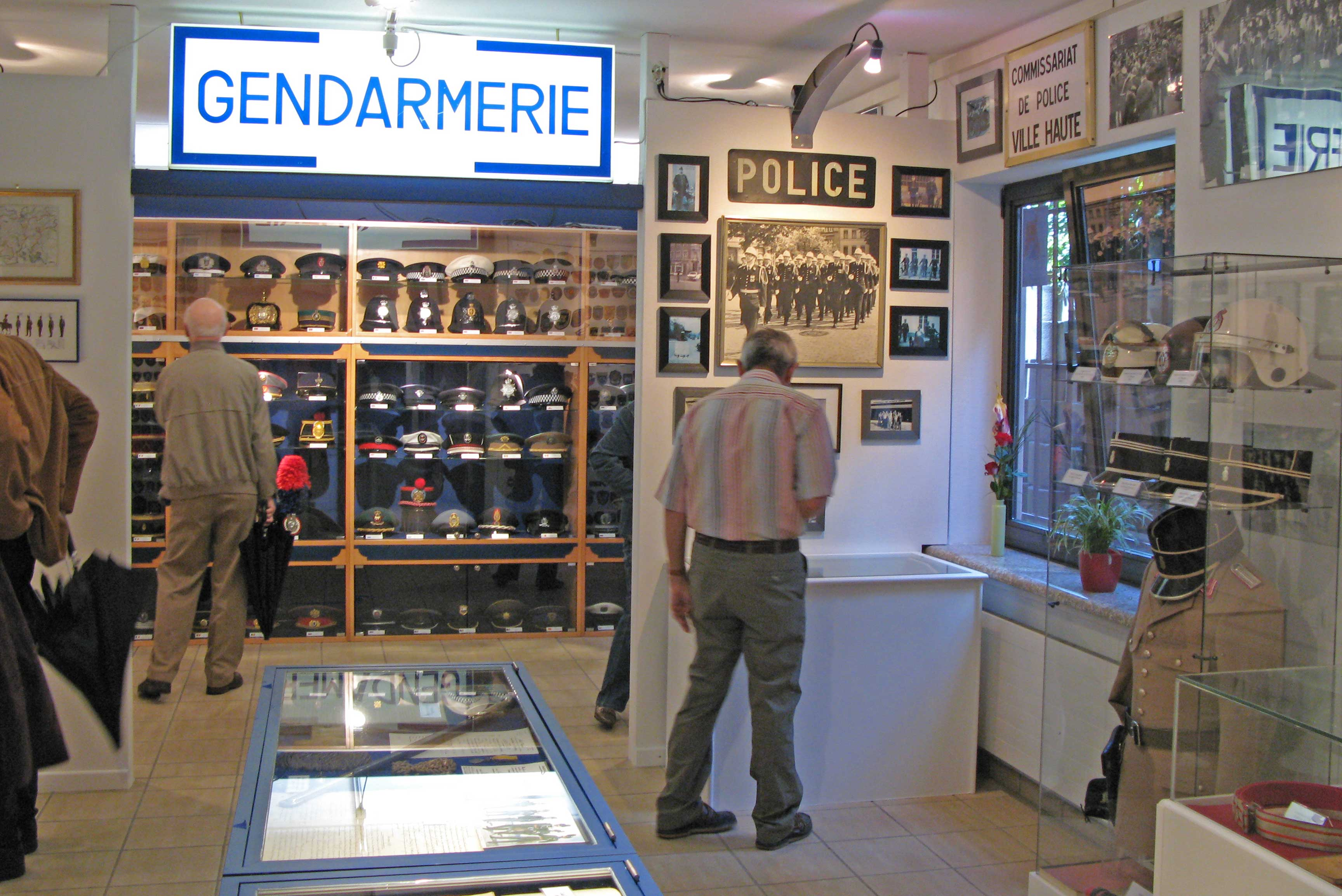 Am Polizeimusée